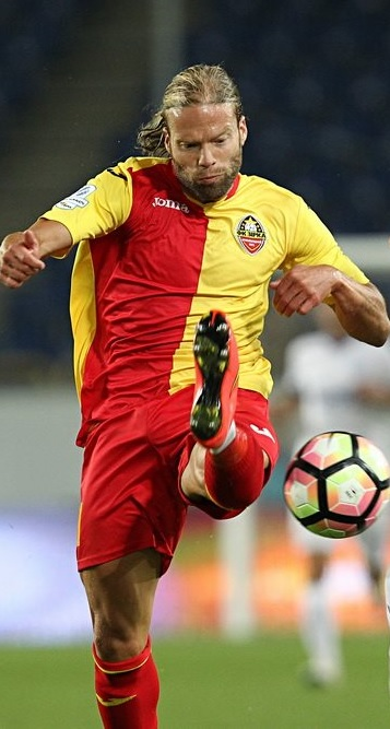 Айтор Фернандес Лопес - испанский футболист